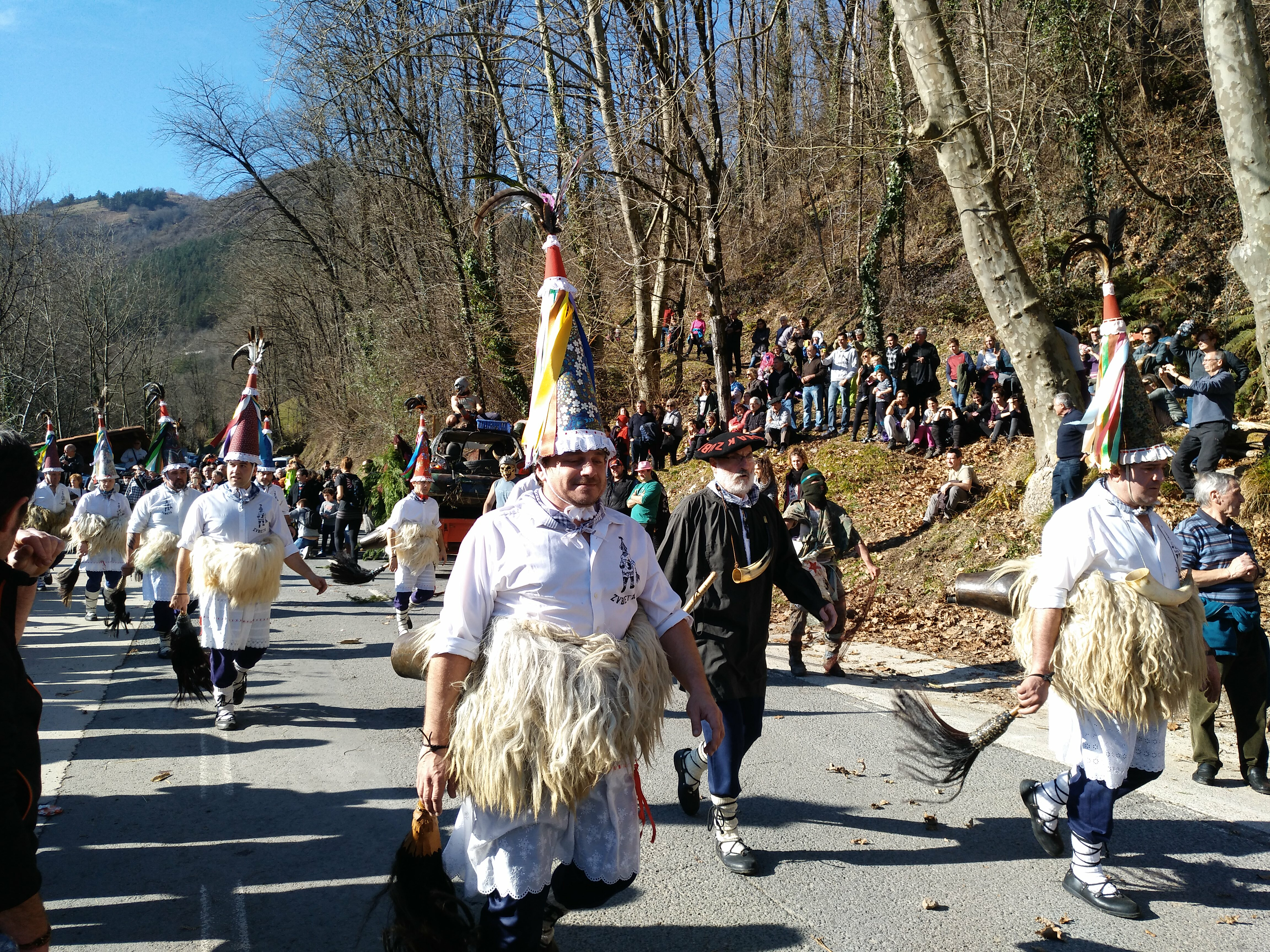 Inauterietako asteartean Zubietako joaldunak Iturengo joaldunen bila joaten dira errotara. Bidea mozorroek inguraturik egiten dute.